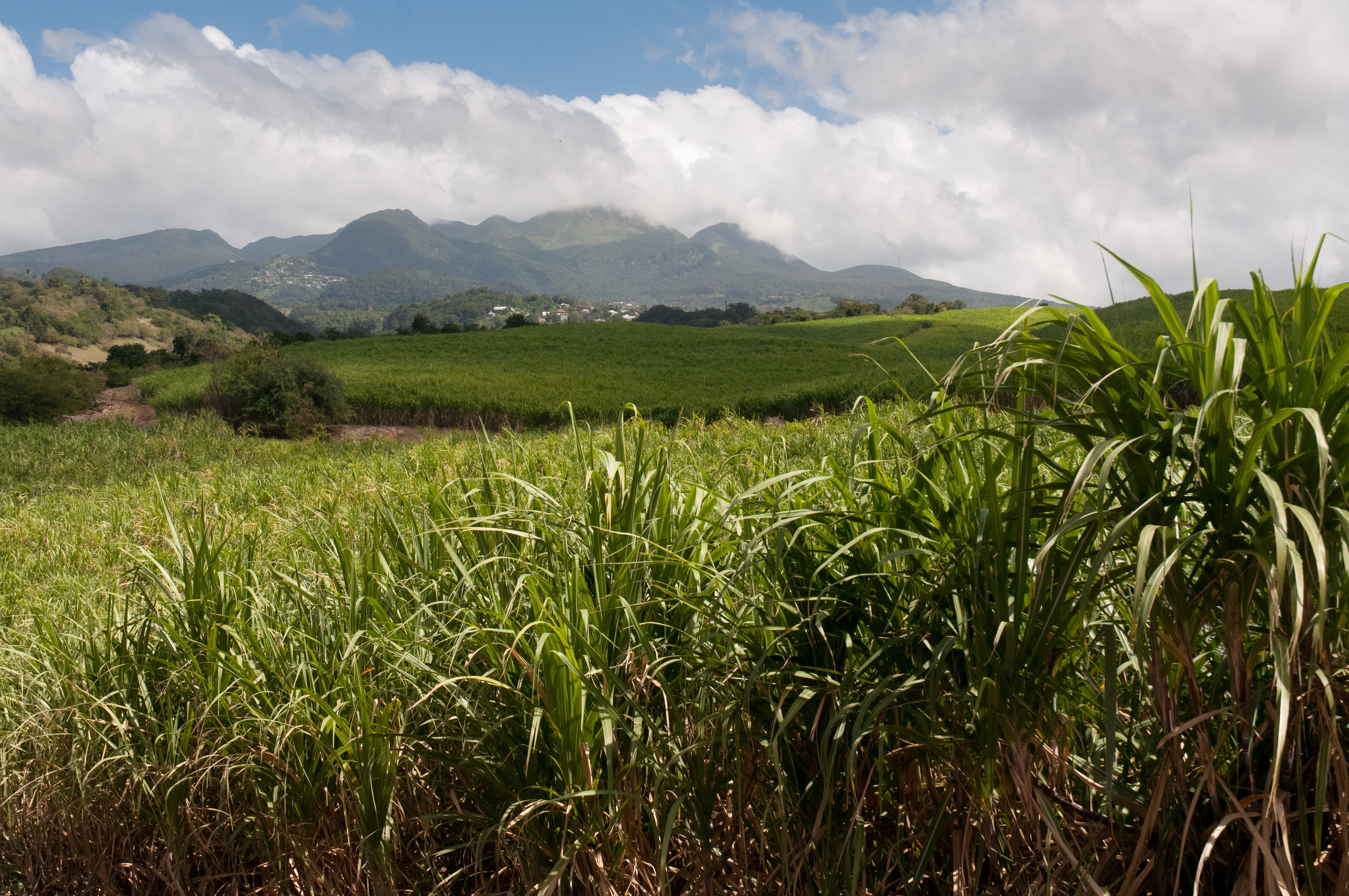 Champ de canne à sucre dans la rhumerie Bologne. On aperçoit au fond la Soufrière dans les nuages (comme très souvent).